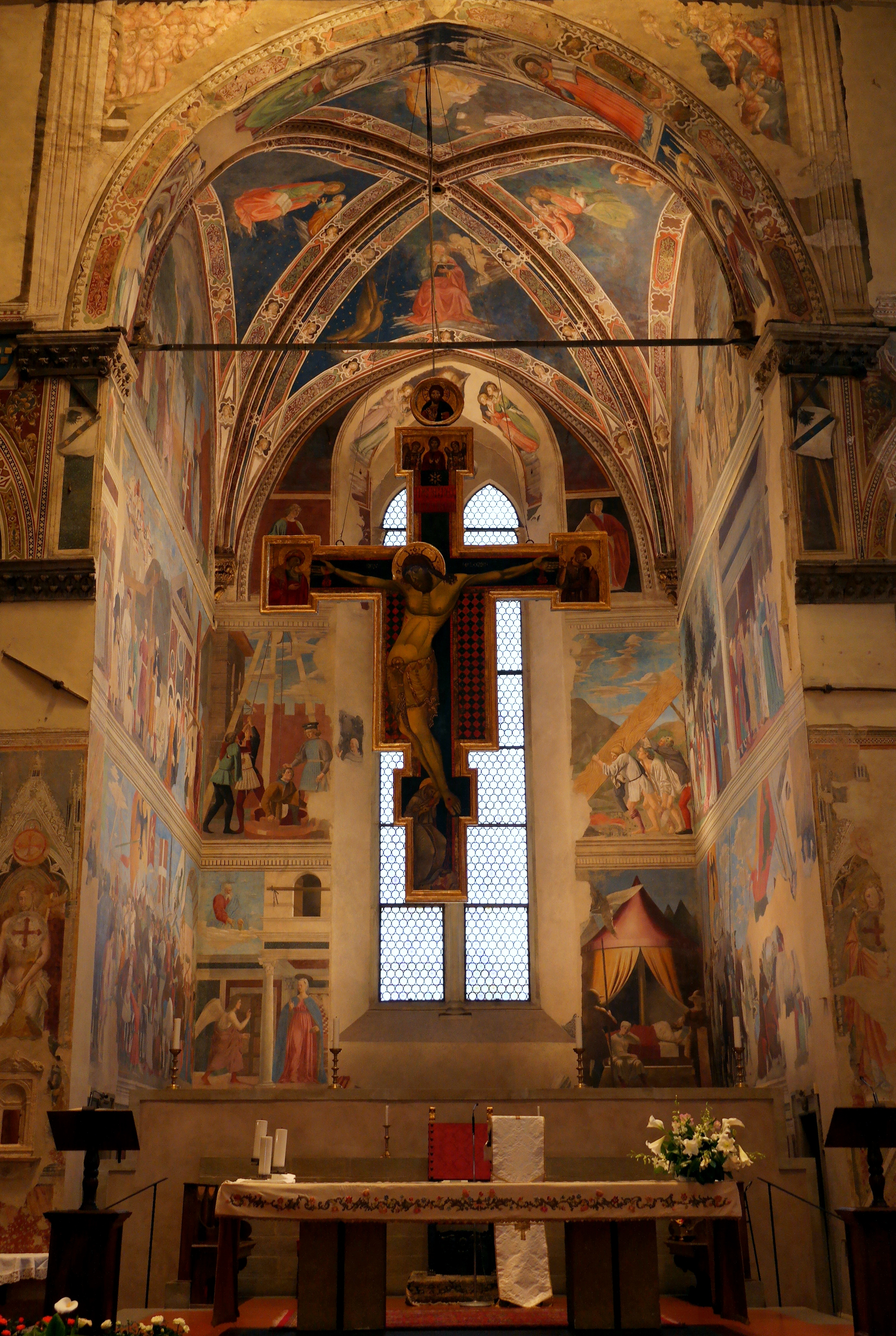 Coro della Chiesa di San Francesco ad Arezzo, che ospita il ciclo di affreschi delle storie della vera Croce eseguiti da Piero della Francesca tra il 1452 e il 1466.